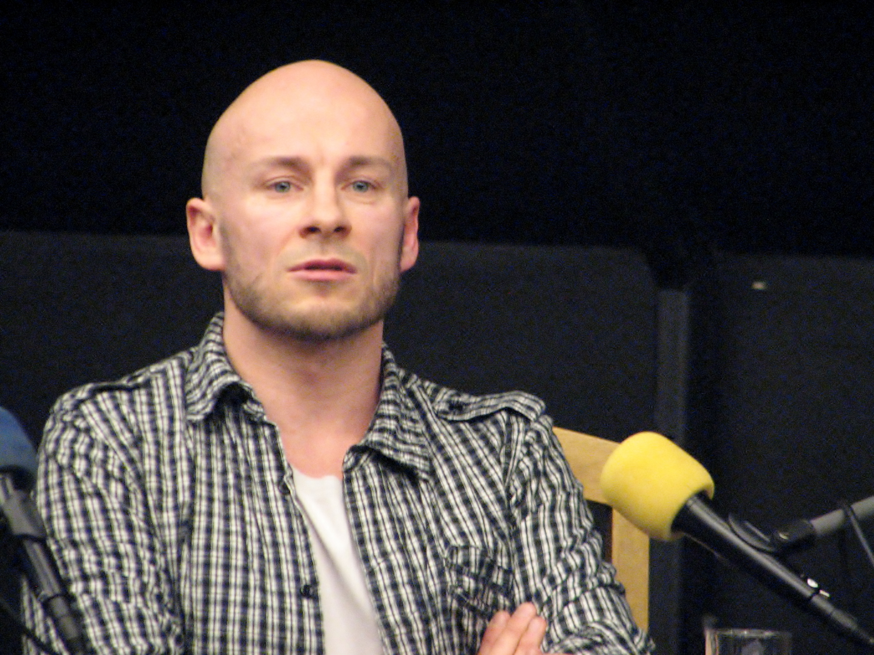 keel" Eesti Draamateatri maalisaalis